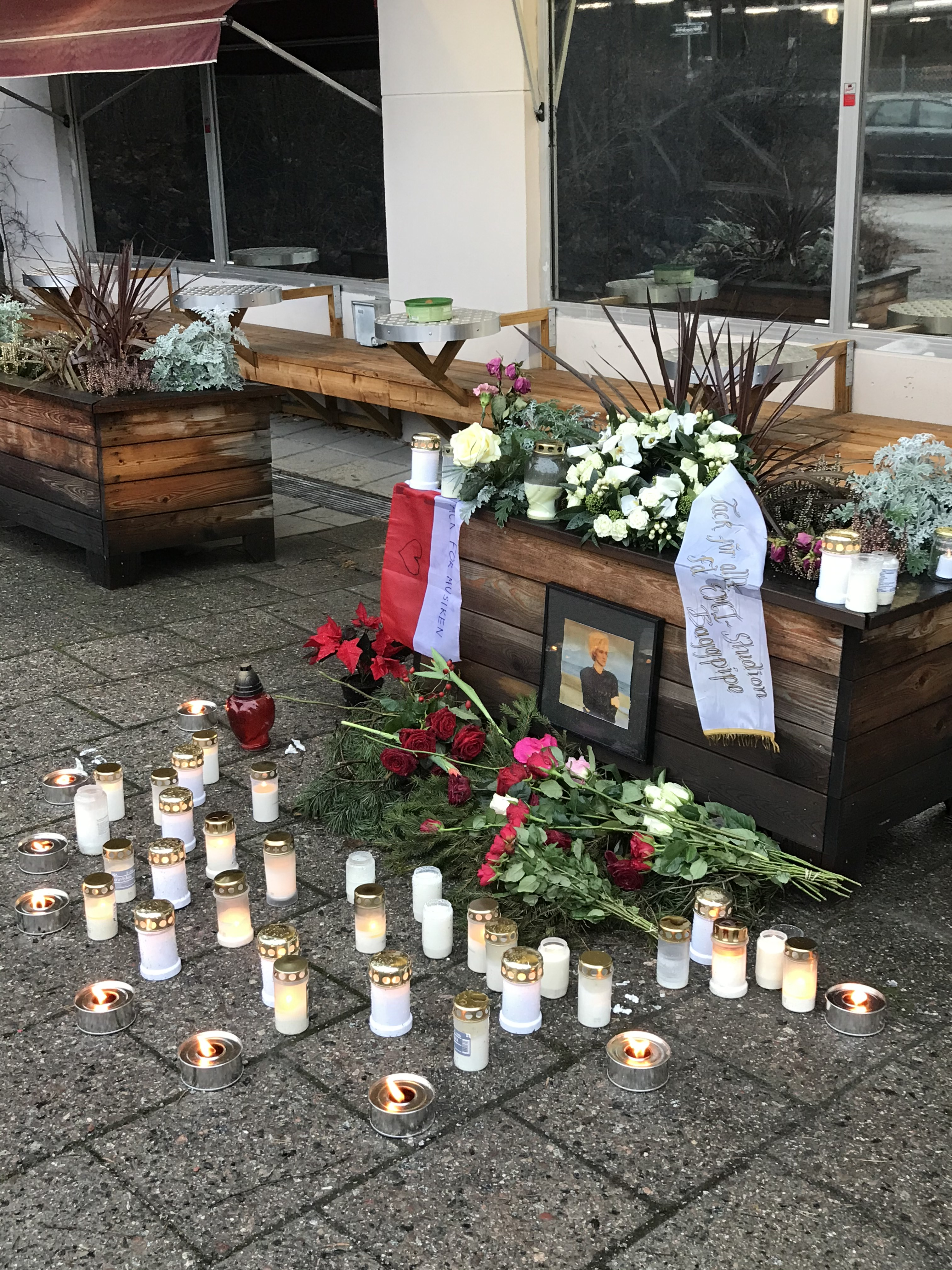 Мемориал Мари Фредрикссон около Baggpipe Studios в Стокгольме, Швеция, 14 дек 2019 г.